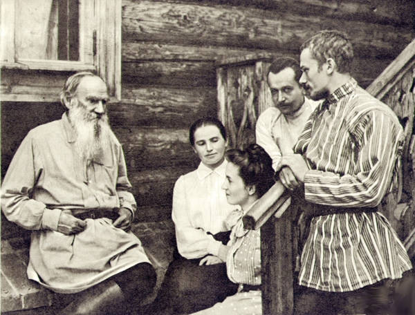 Лев Толстой